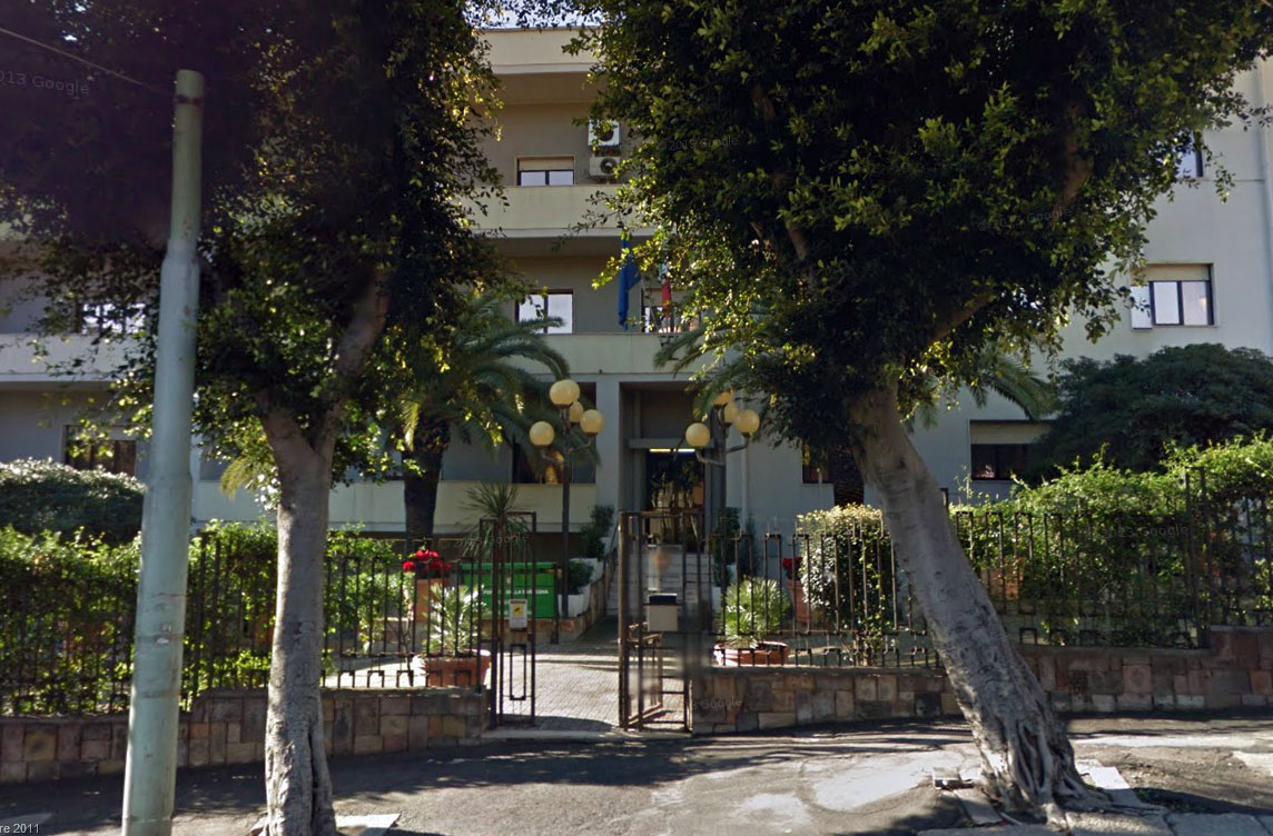 Sede della Presidenza e della Direzione Generale dell'Ente Foreste della Sardegna, Cagliari